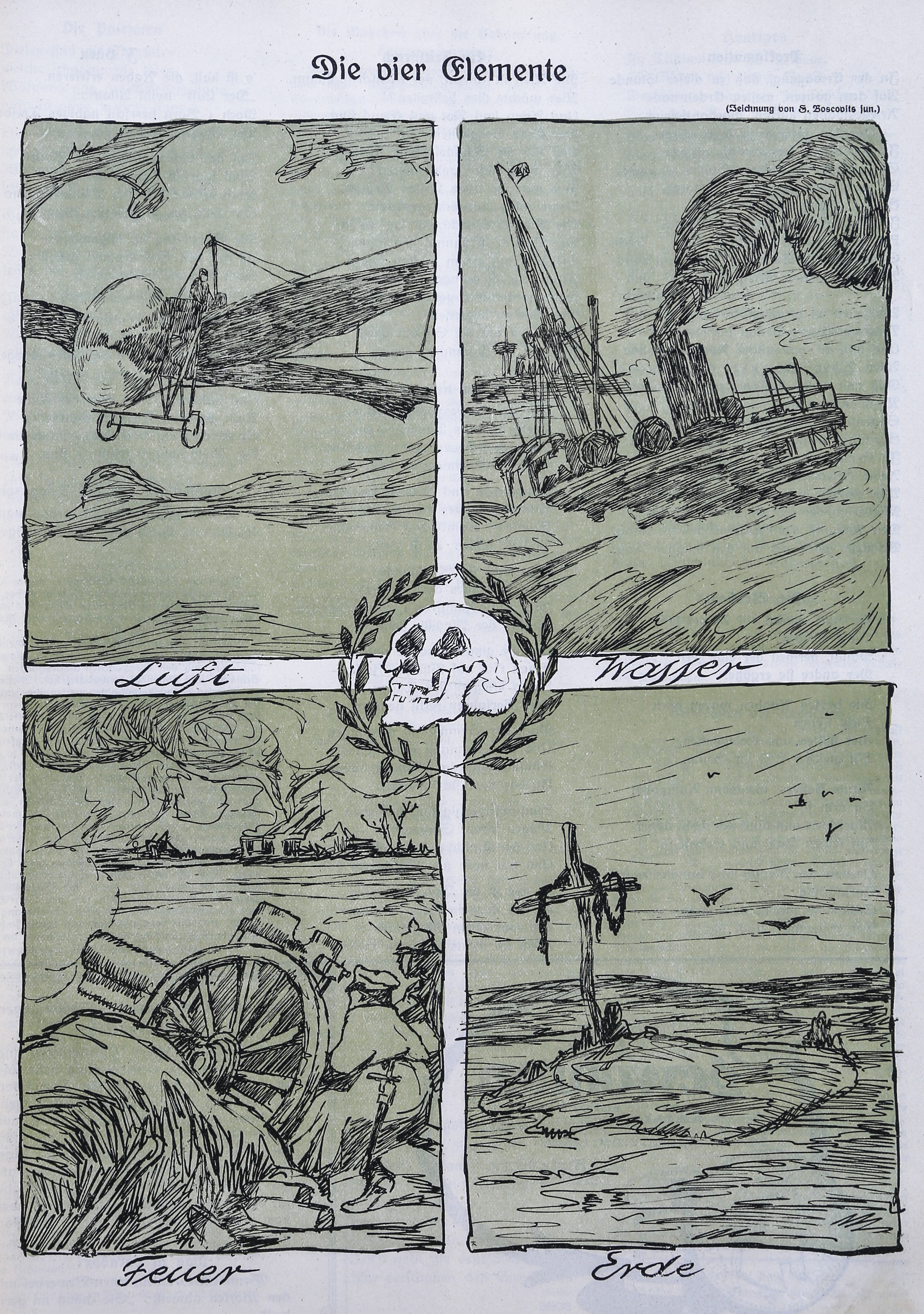 Druck